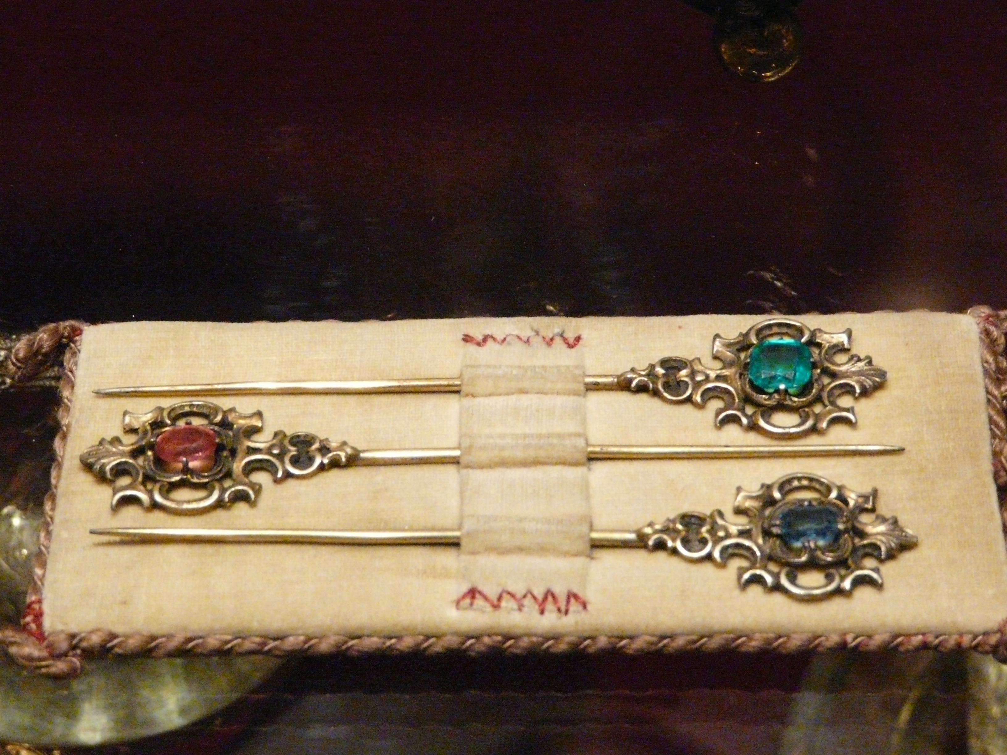 Museum of Archdiocese in Gniezno Szpile Jana XXIII. Szpile dwie z futerałem z drugiej połowy XIV w. ; szpile srebne pozłacane, główki ze szlachetnym kamieniem, futerał - aksamit obszyty sznureczkiem. Uwaga: ja widze trzy szpile ale w muzeum na karteczce pisalo co powyzej...